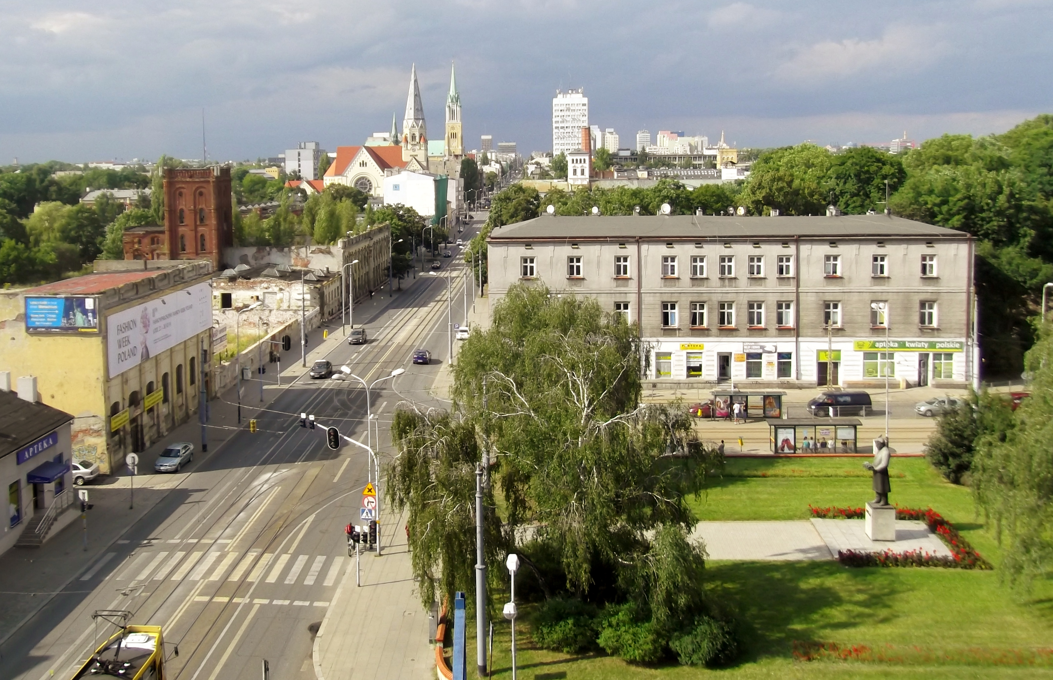 Łódź, zespół ulicy Piotrkowskiej, kon. XIX